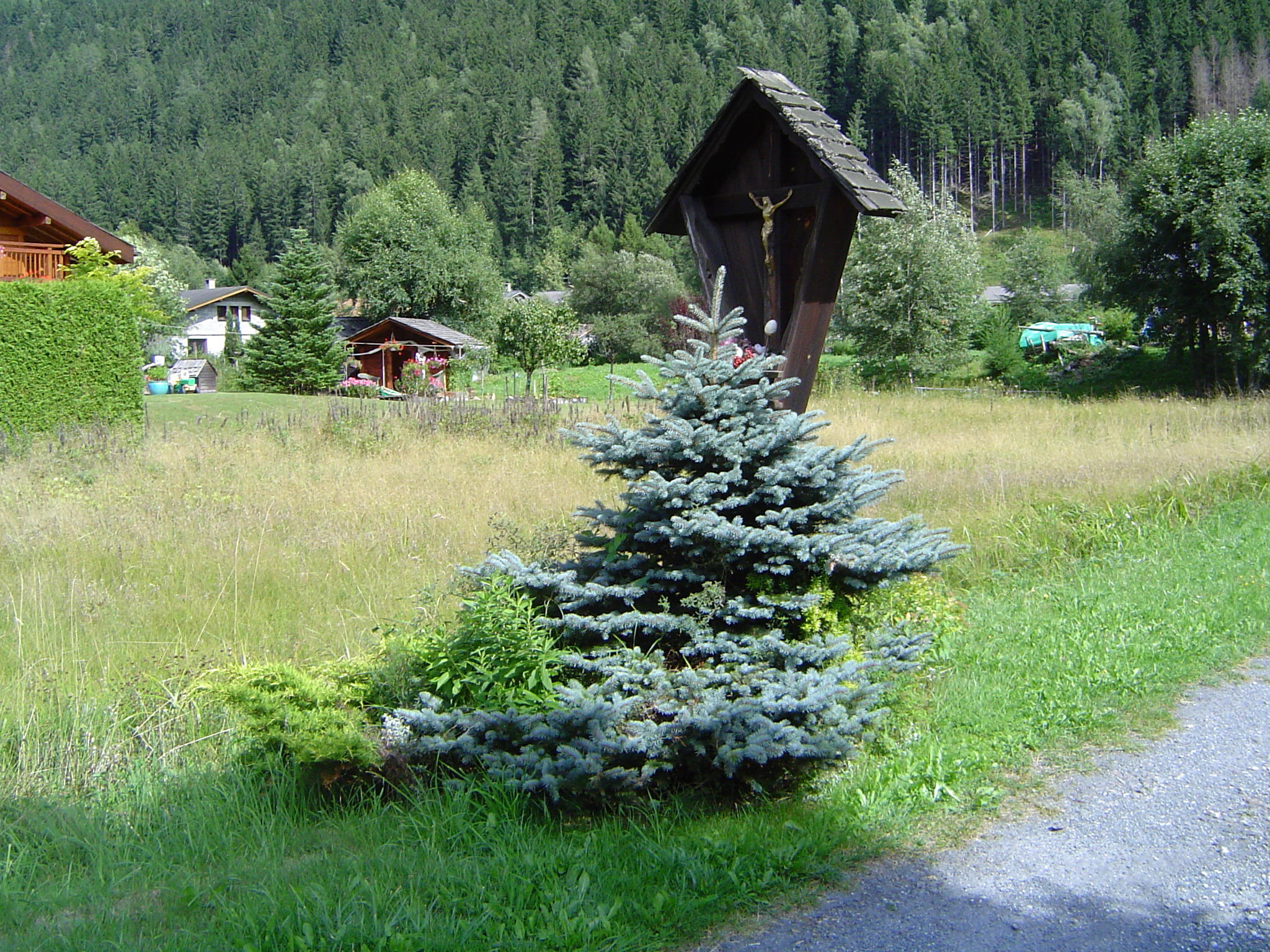 Photos prises dans la commune de Chamonix-Mont-Blanc